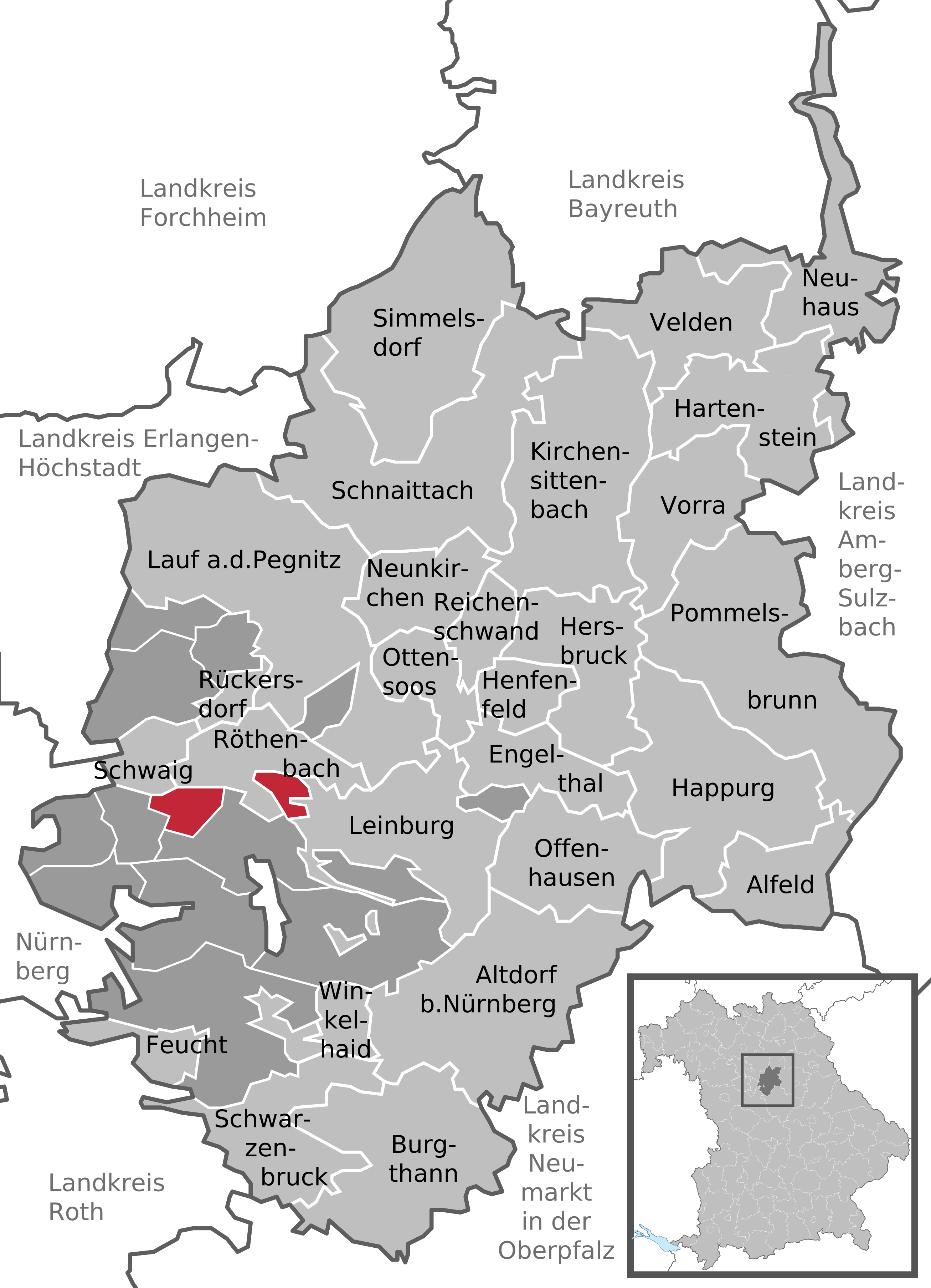 Positionskarte des gemeindefreien Gebietes Haimendorfer Forst